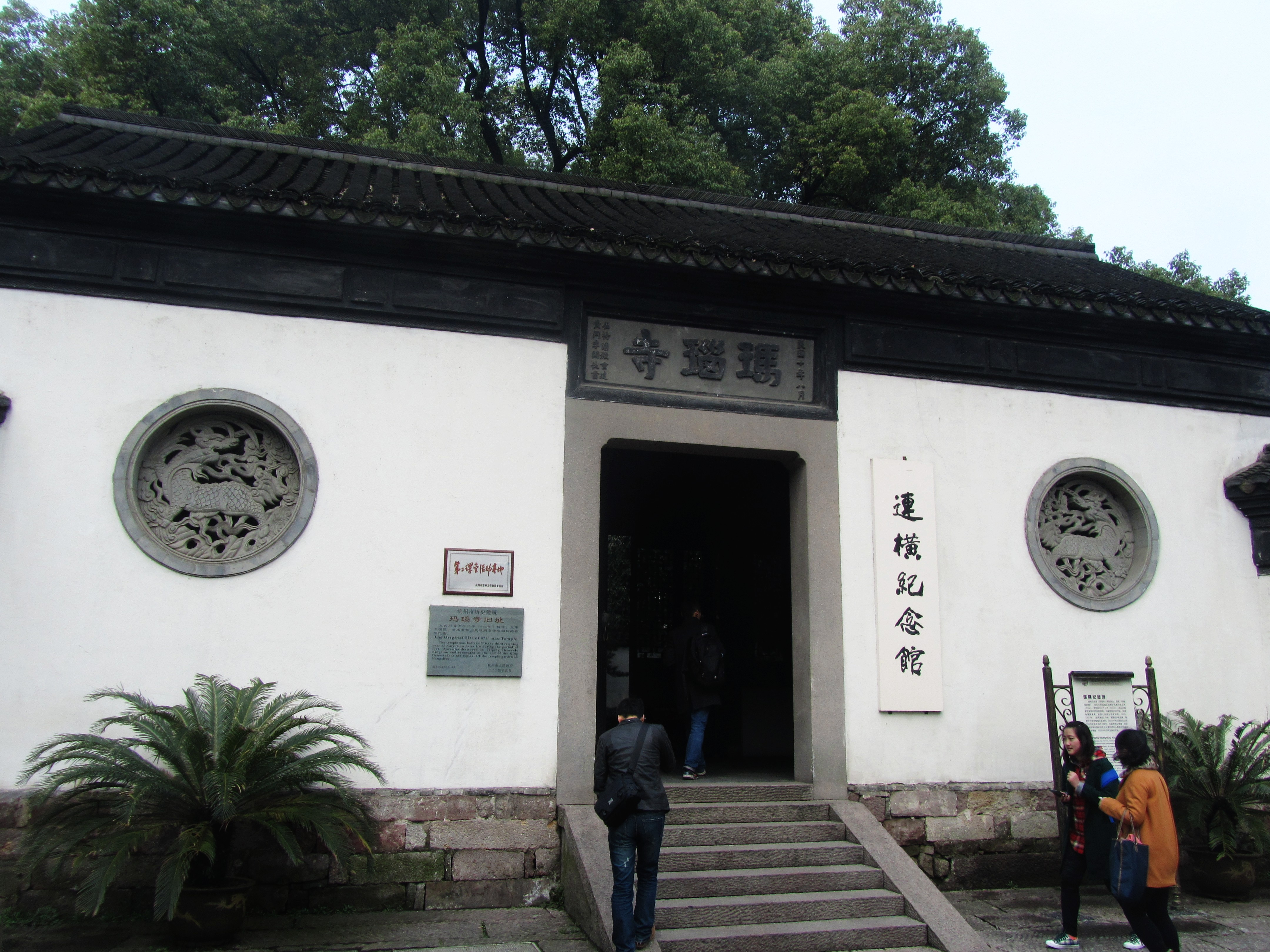 杭州玛瑙寺旧址，山门。